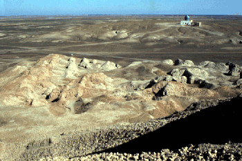 فغثت